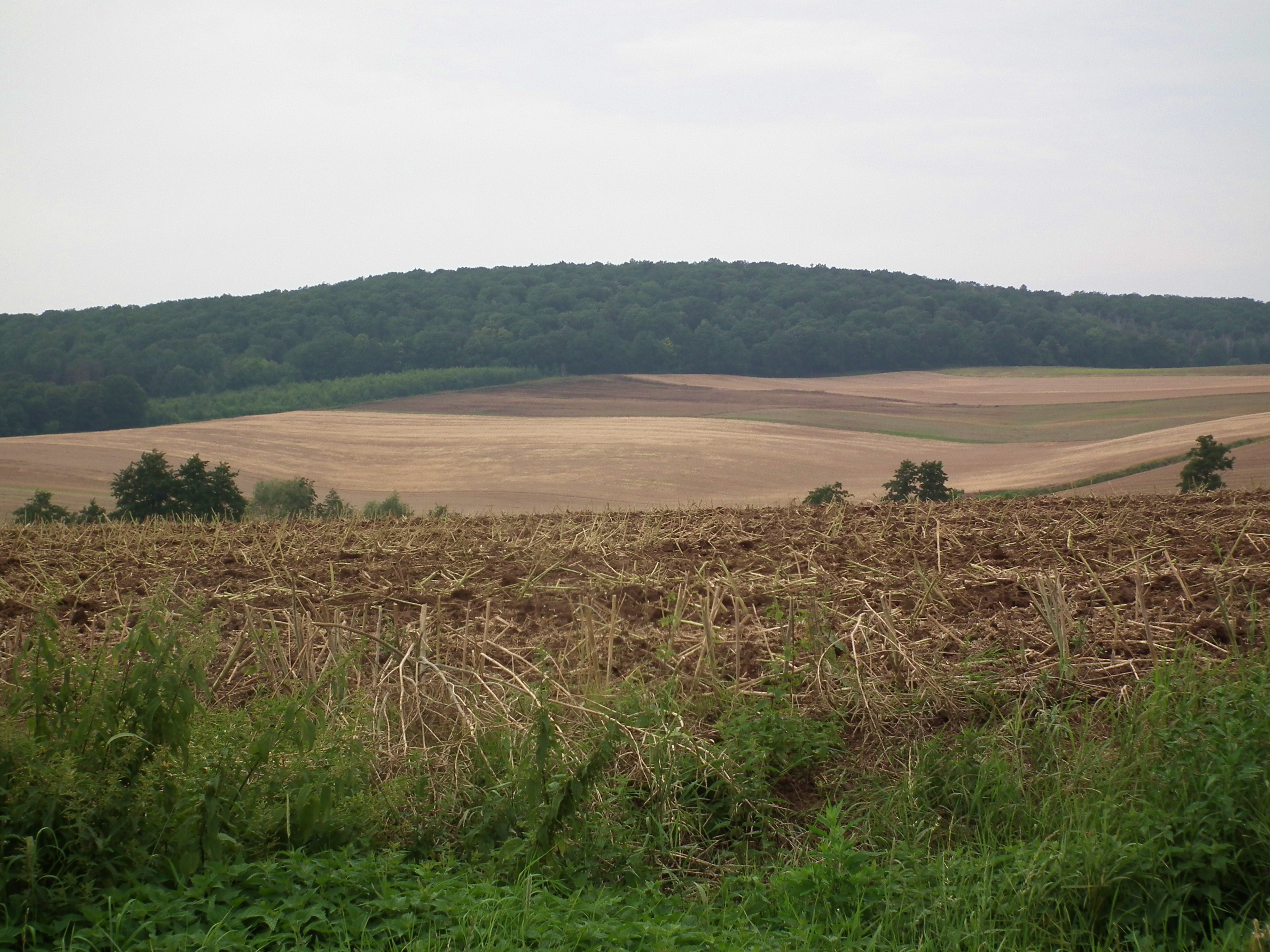 Tylna Dębowa Góra we Wzgórzach Dębowych widziana z okolic Strachowa.